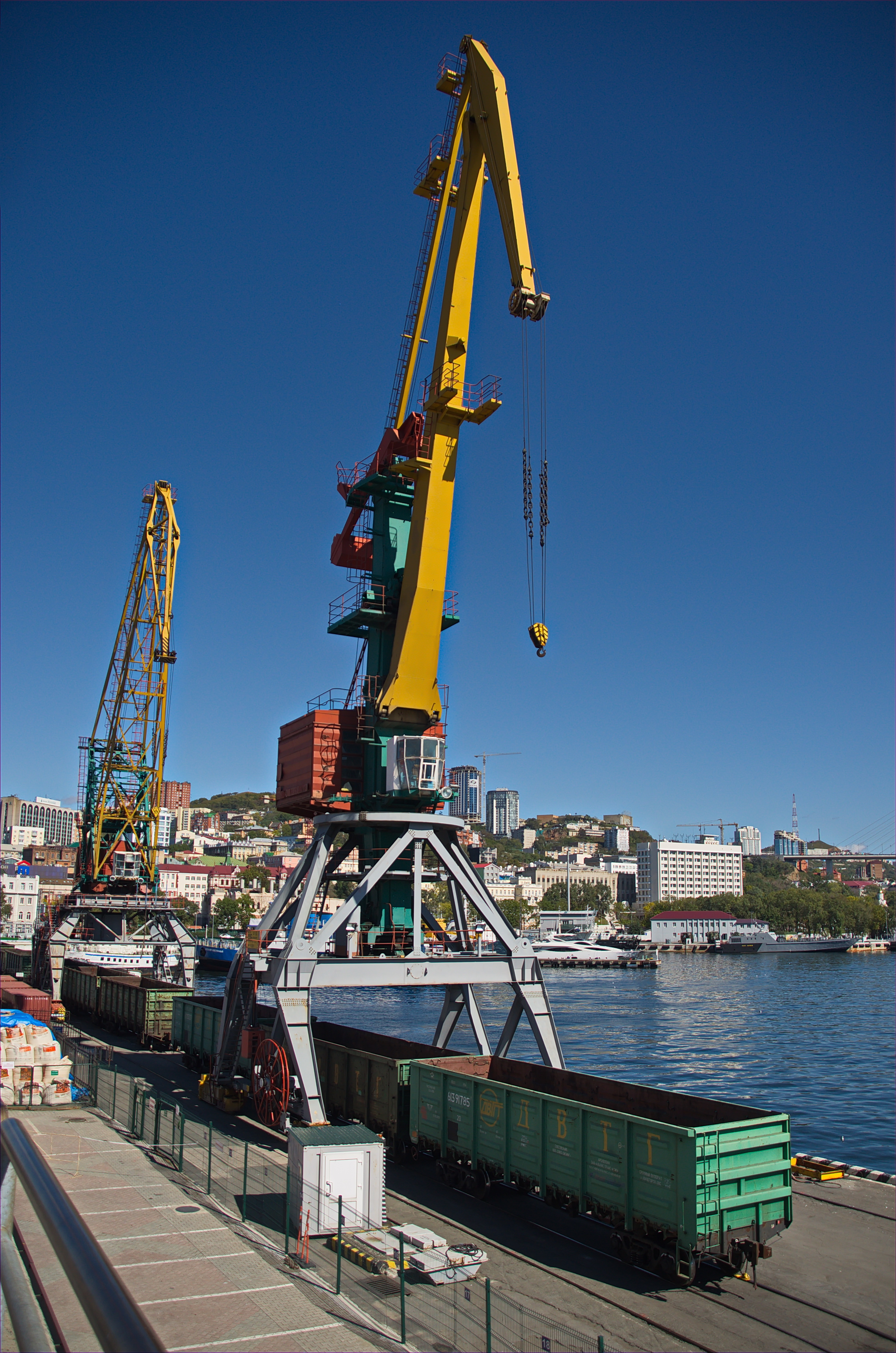 008 - Wladiwostok 2015